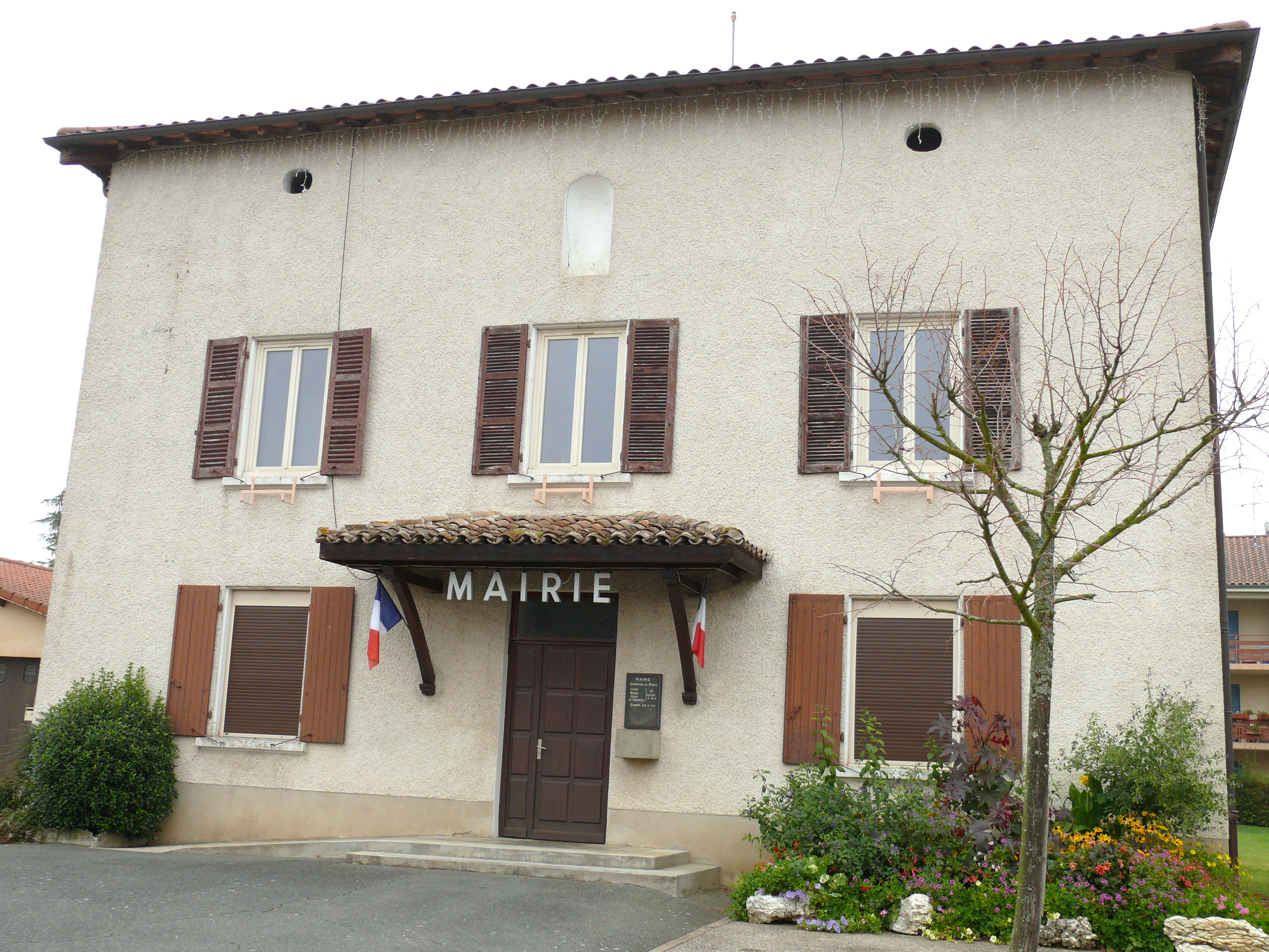 Savigneux (Ain) - Mairie